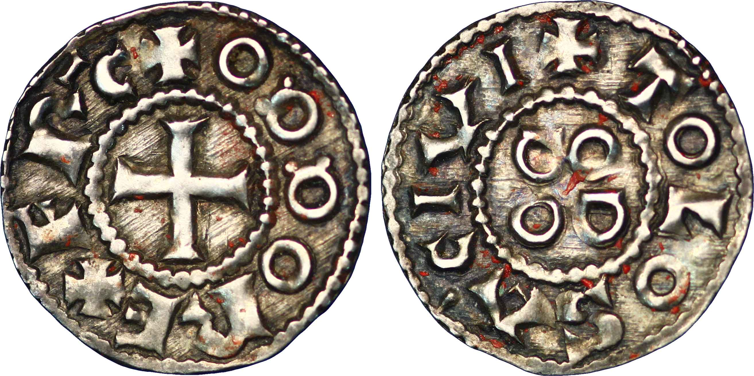 Nom de l'atelier/ville : Toulouse Métal : argent Diamètre : 20,5 mm Axe des coins : 4 h. Poids : 1,58 g. Degré de rareté : R1 Titulature avers : + ODDO REX FR-C. Description avers : Croix. Traduction avers : (Eudes, roi des Francs). Titulature revers : + TOLOSA CIVI. Description revers : O/D/D/O dans le champ. Traduction revers : (Cité de Toulouse ; Eudes)